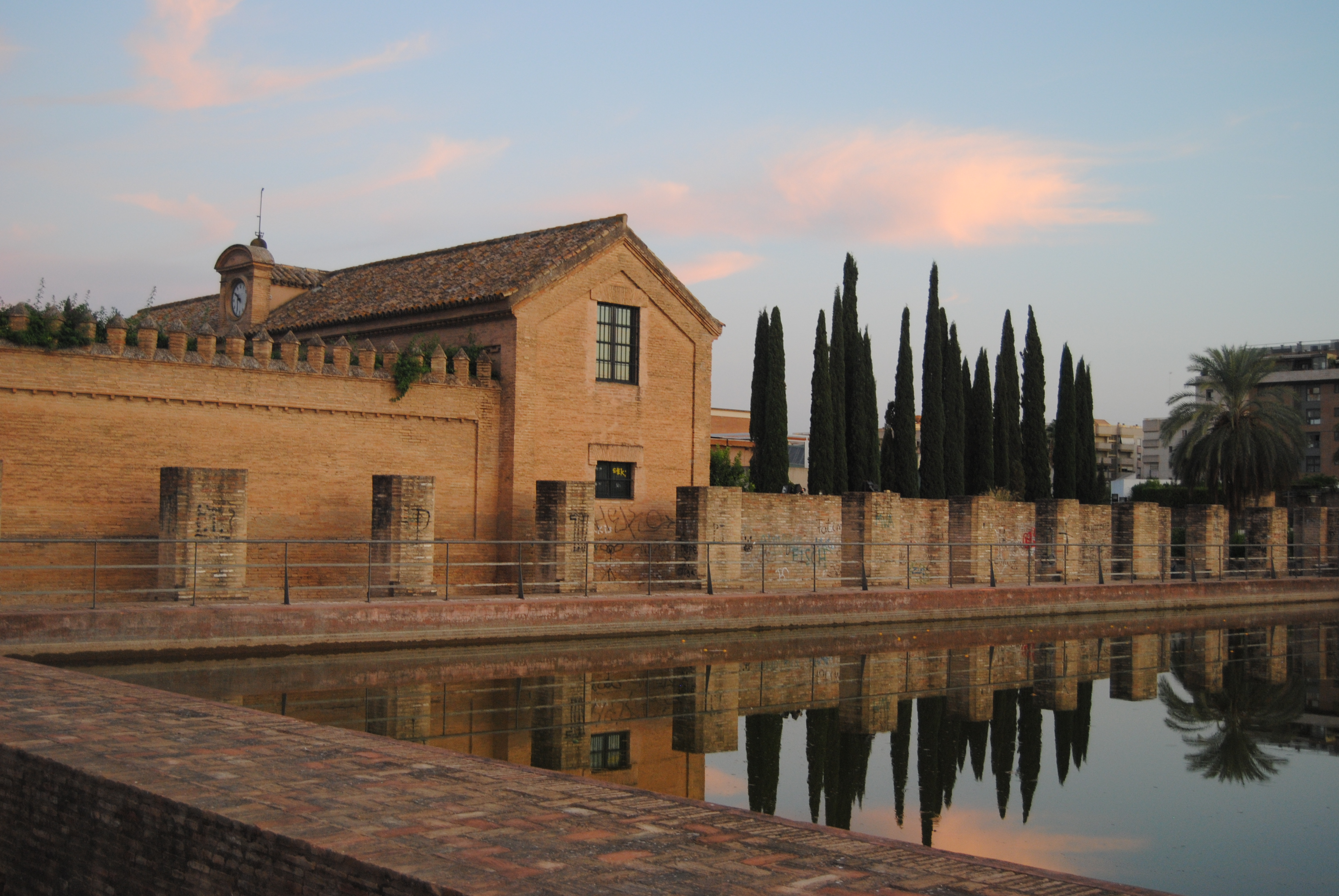 Antiguos palacios de los Jardines de la Buhaira This photograph was taken with a Nikon D3000